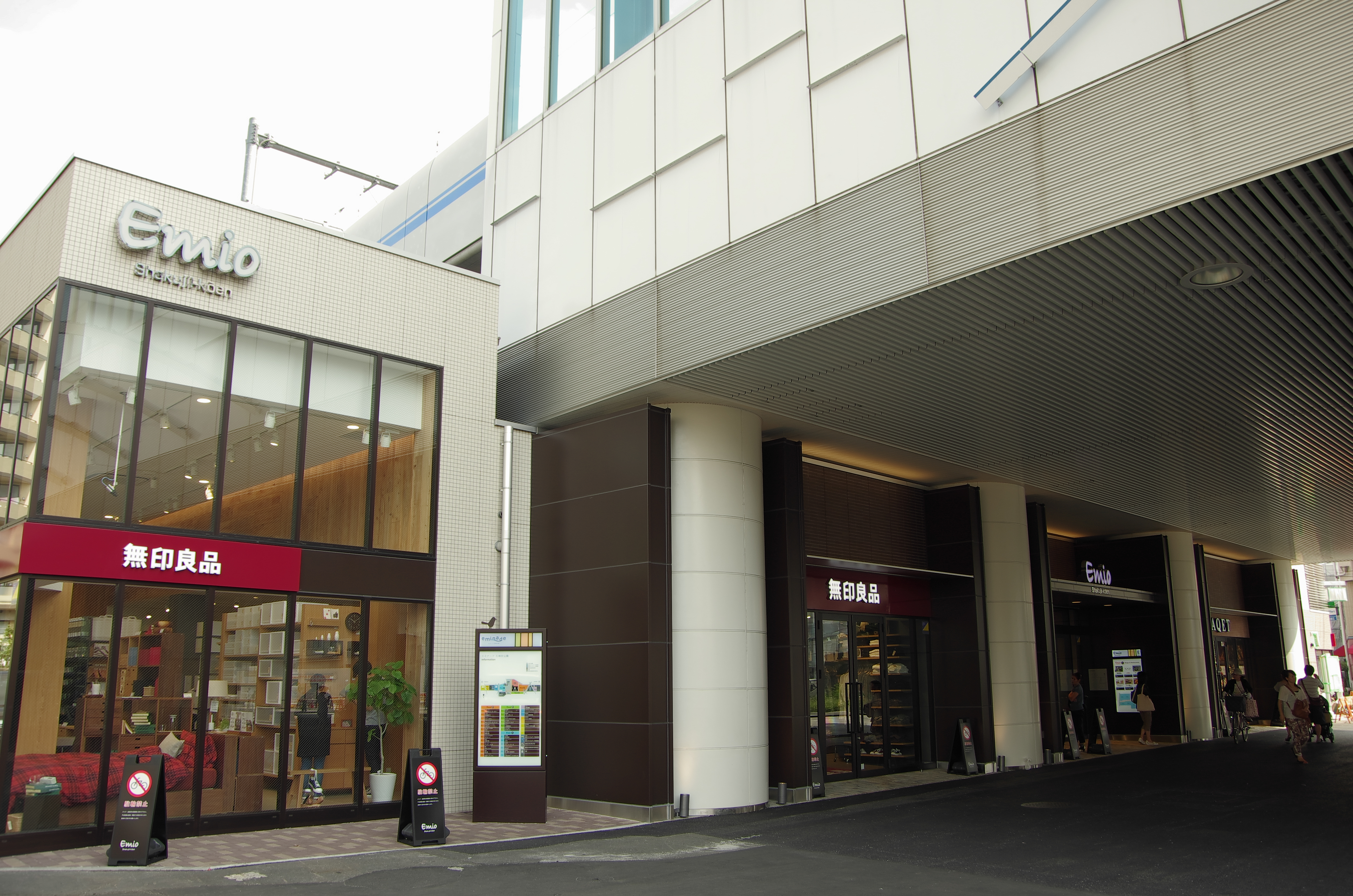 Emio石神井公園Eastを西側から撮影